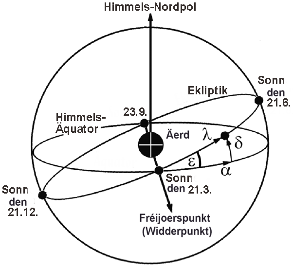 Ekliptik